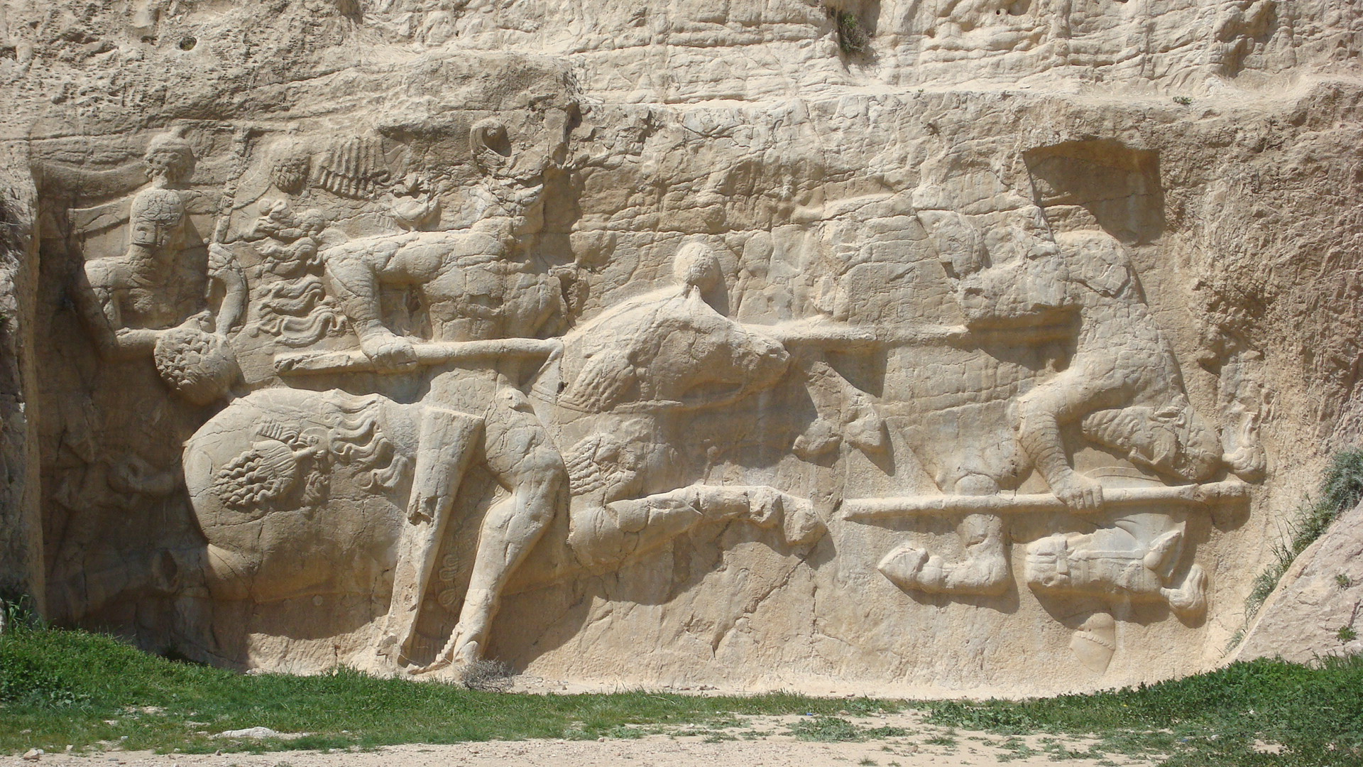 نقش رستم